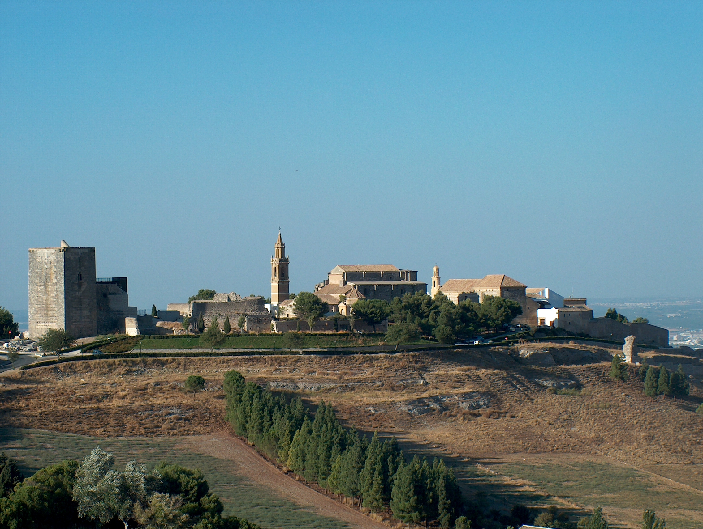 Cerro de San Cristobal, imagen tomada desde la Sierra del Becerrero